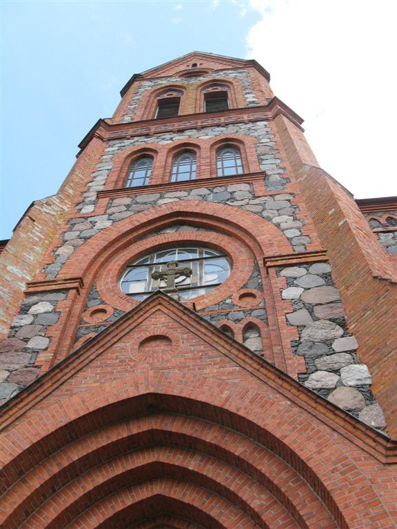 Žiobiškio Šv. arkangelo Mykolo bažnyčia